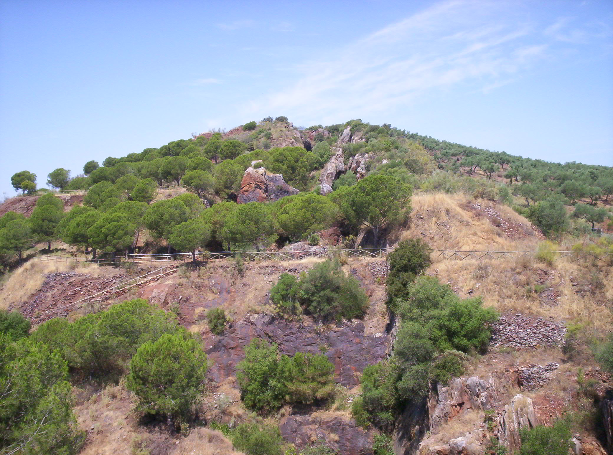 Mina la Jayona - Fuente del Arco (Badajoz, España) - Vistas desde el acceso al nivel 4